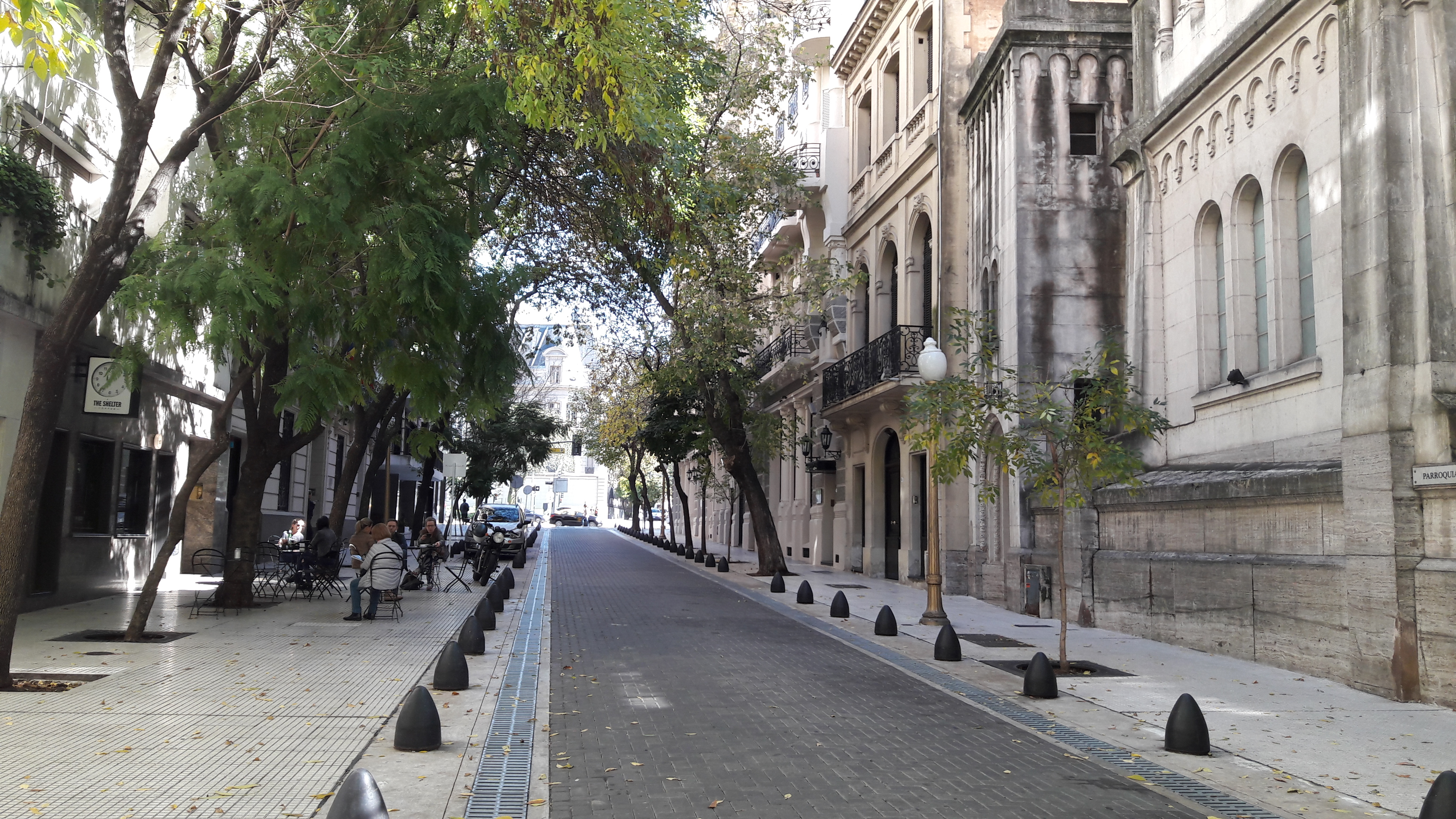 Calle Arroyo, Buenos Aires.